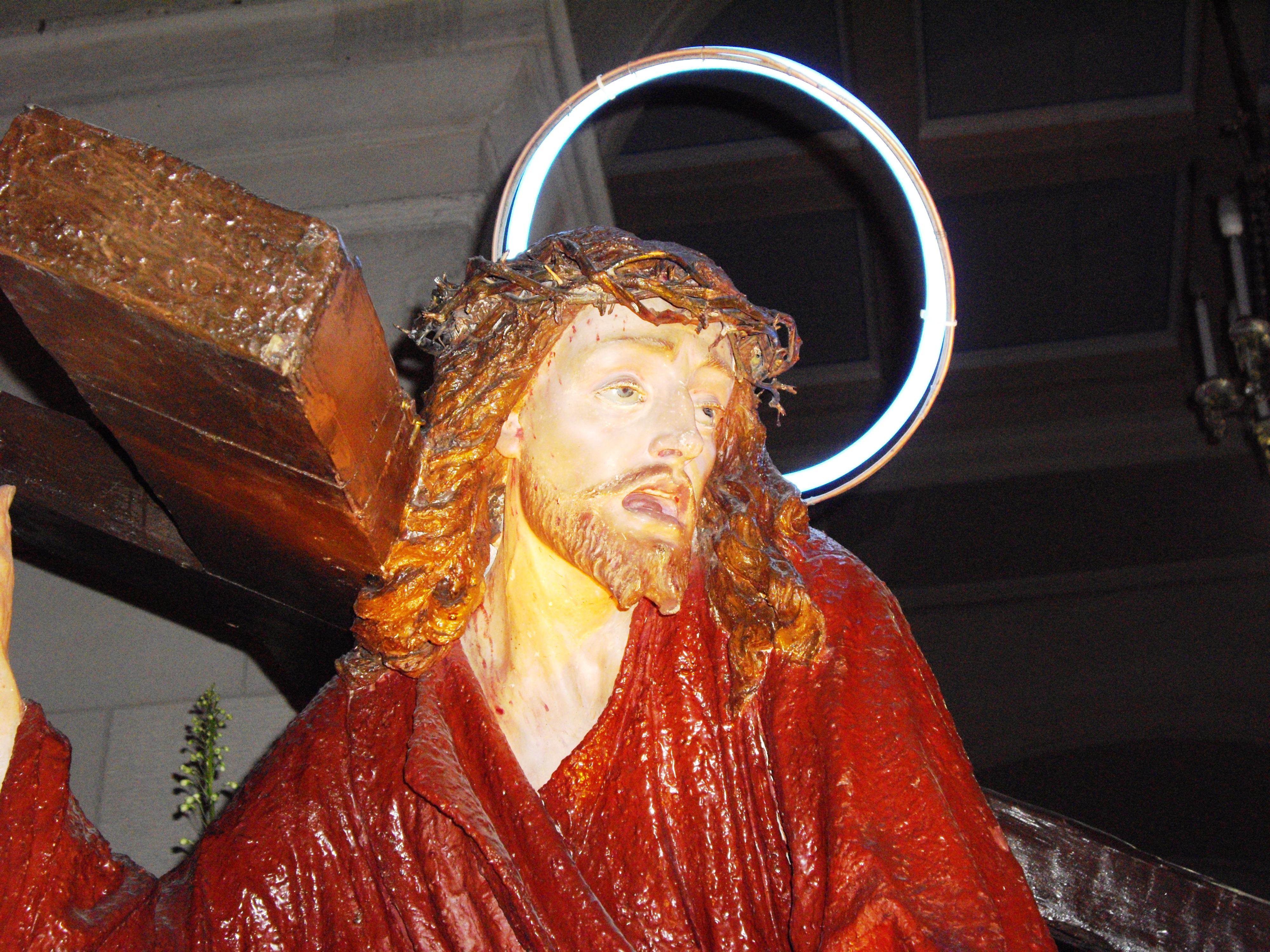 Pasqua 2009